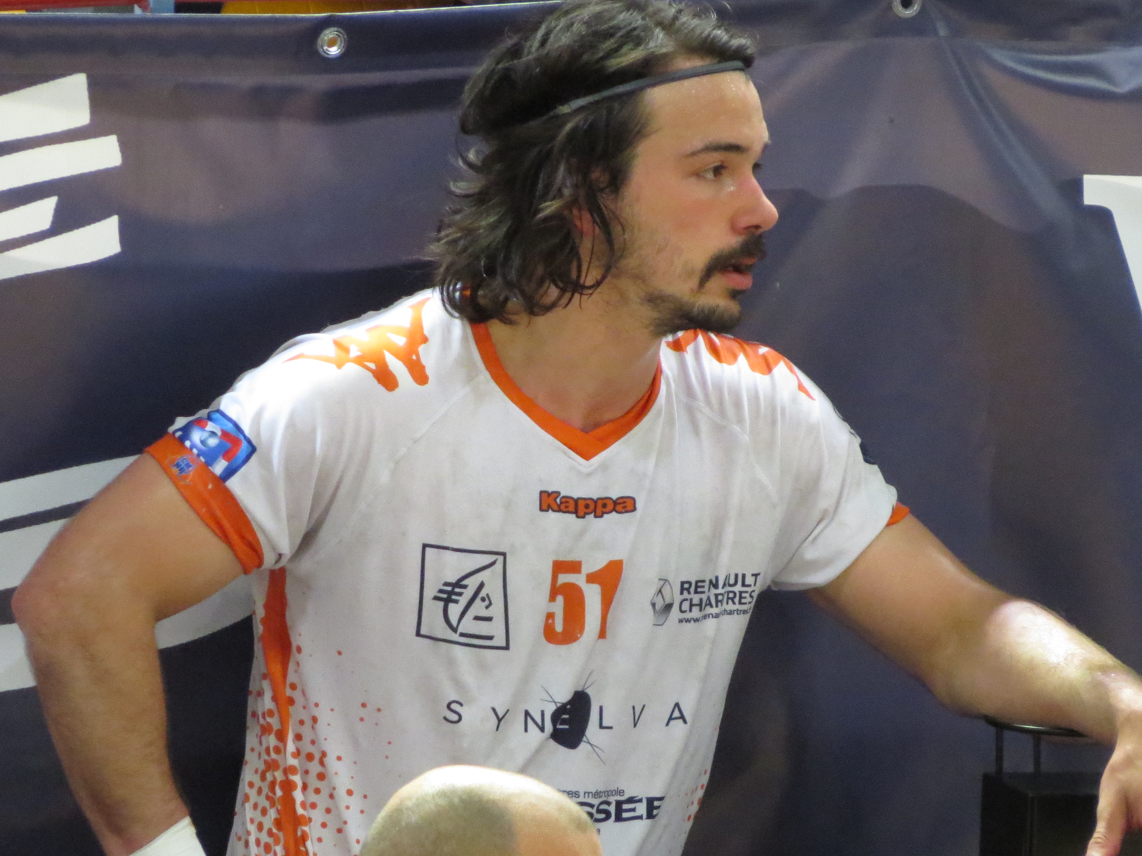 Match du championnat de France de Hand entre Créteil et Chartres Victoire de Créteil 39 - 35 51 : Louis Roche